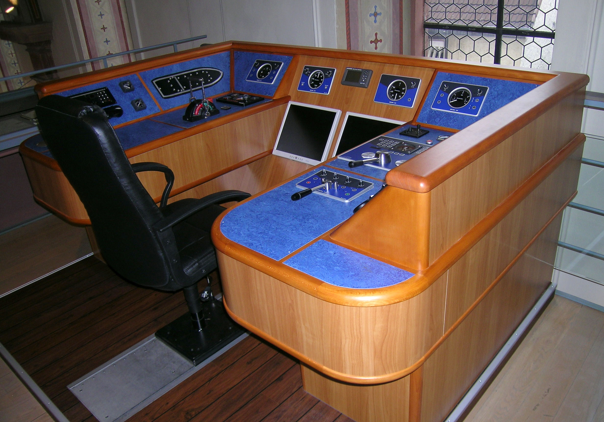 Schifffahrts- und Schiffbaumuseum Wörth am Main (Nachbau eines Fahrstands eines modernen Binnenschiffes)